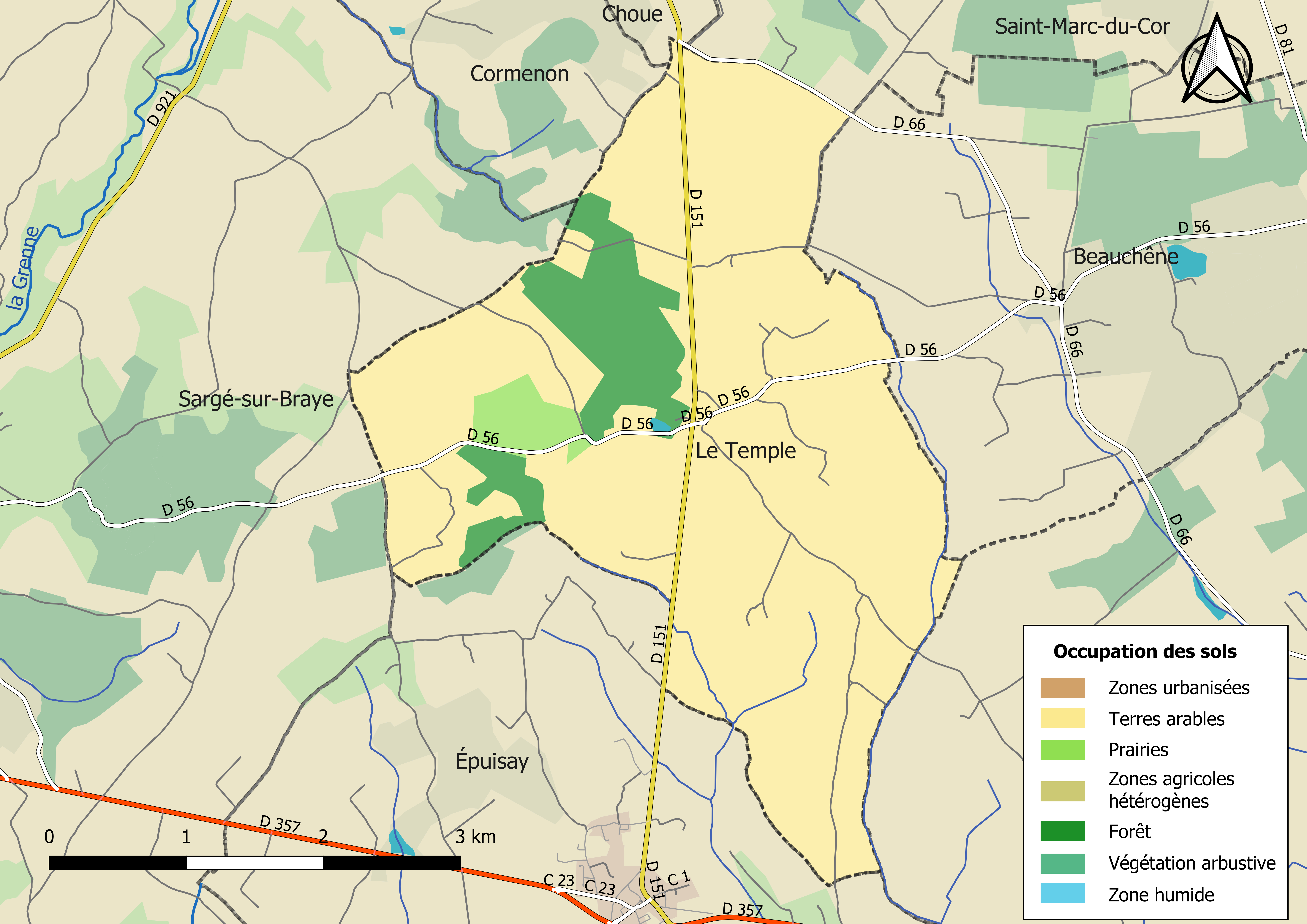 Carte des infrastructures et de l’occupation des sols en 2018 de la commune de Le Temple (Loir-et-Cher) (France).